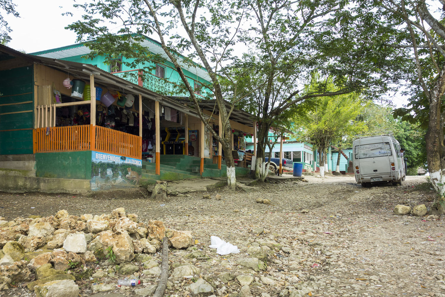 La Tecnica, Guatemala